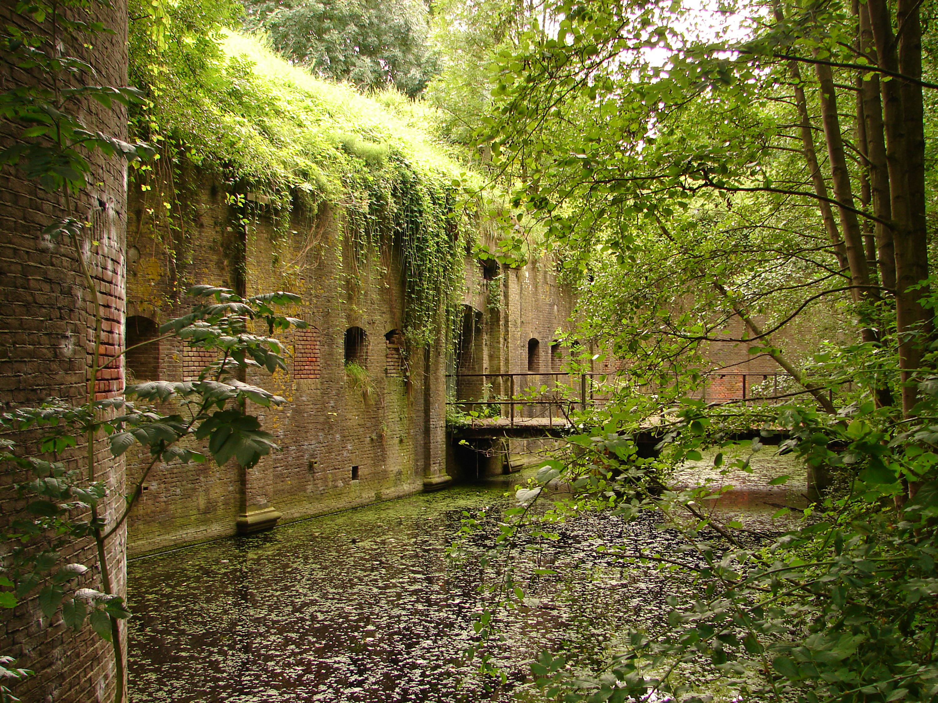 Het reduit van Fort Vechten te Utecht, met de toegangspoort en een gedeelte van de gracht.